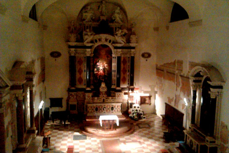 La chiesa di Santa Caterina d'Alessandria a Padova.